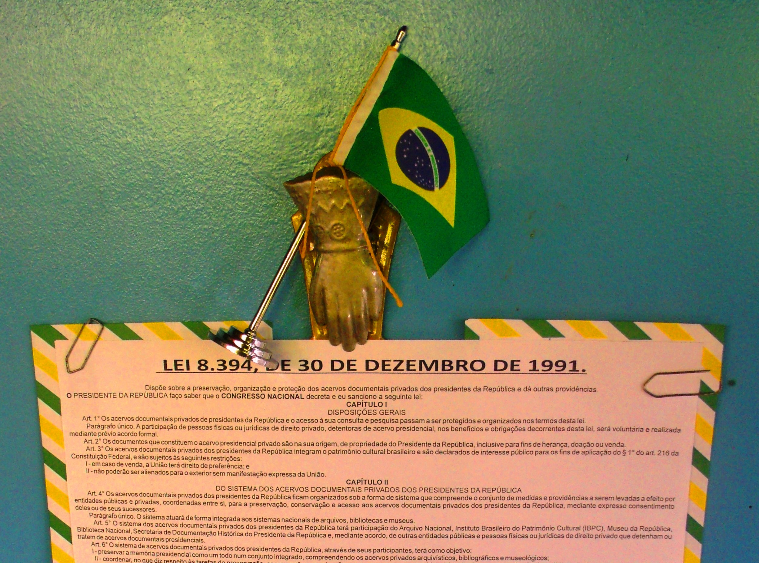 Decoração cívica com parte da Lei dos acervos do presidentes do Brasil.